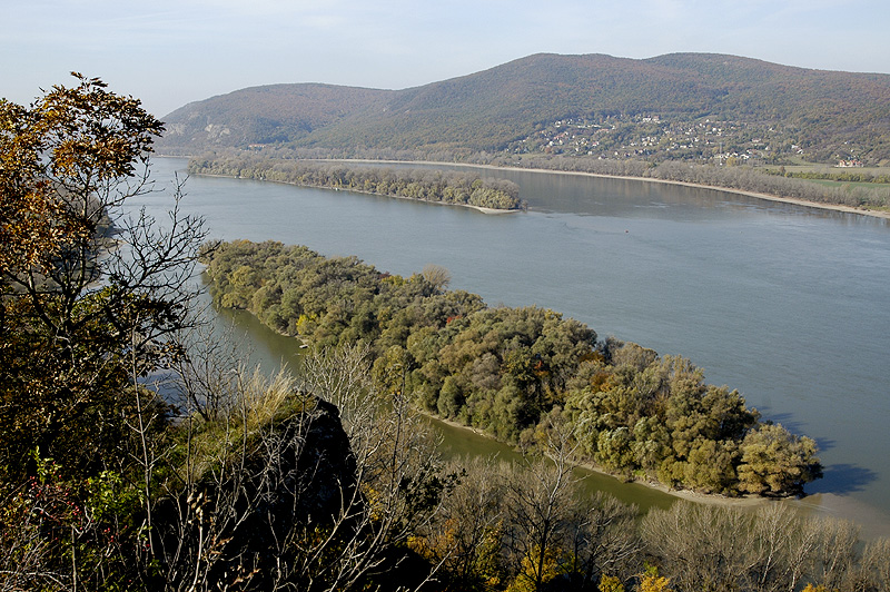 Kilátás az esztergomi hideglelős kereszttől a Dunára nyugat felé. Előtérben a Törpe-sziget, hátul a Helemba-sziget